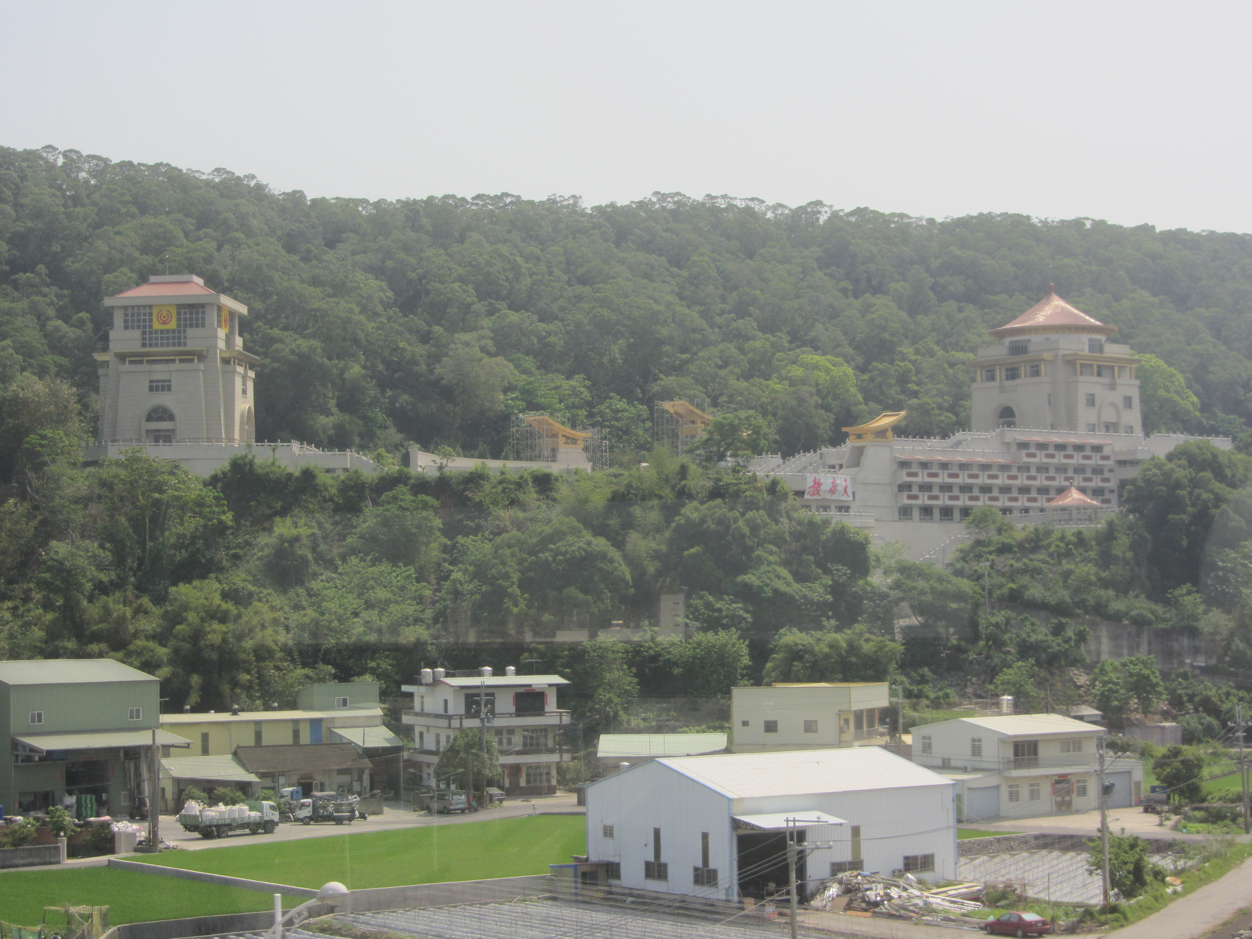 天帝教天安太和道場